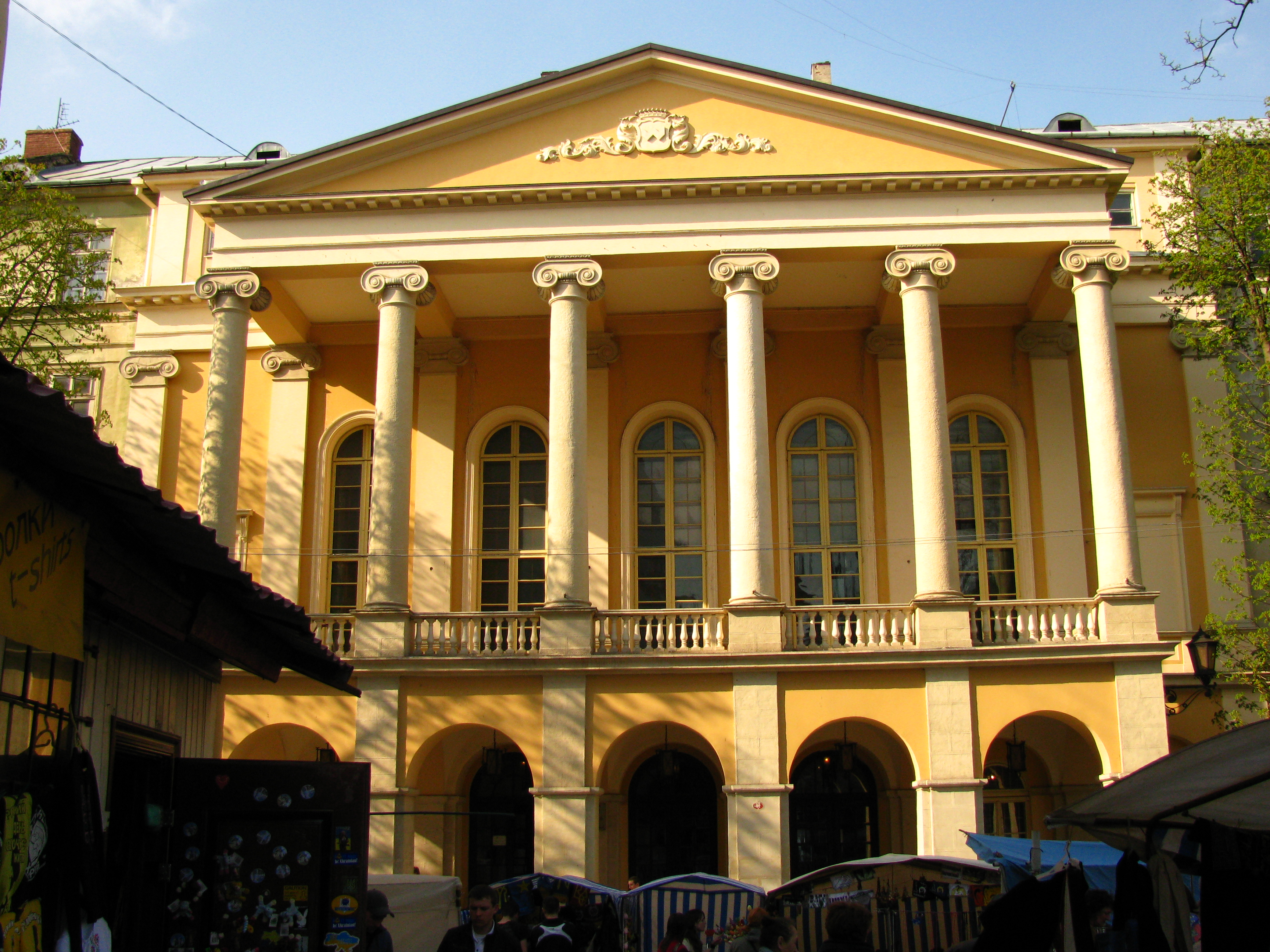 Театр М.Заньковецької Львів.